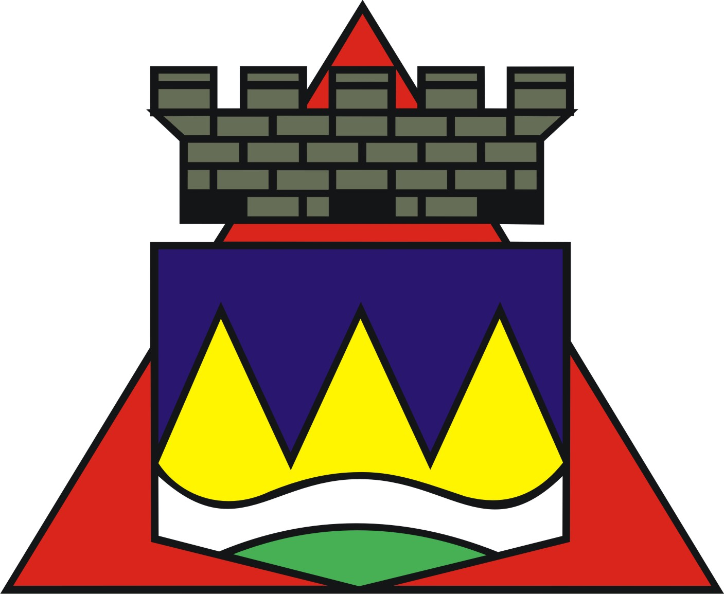 Brasão da Cidade de Brumadinho